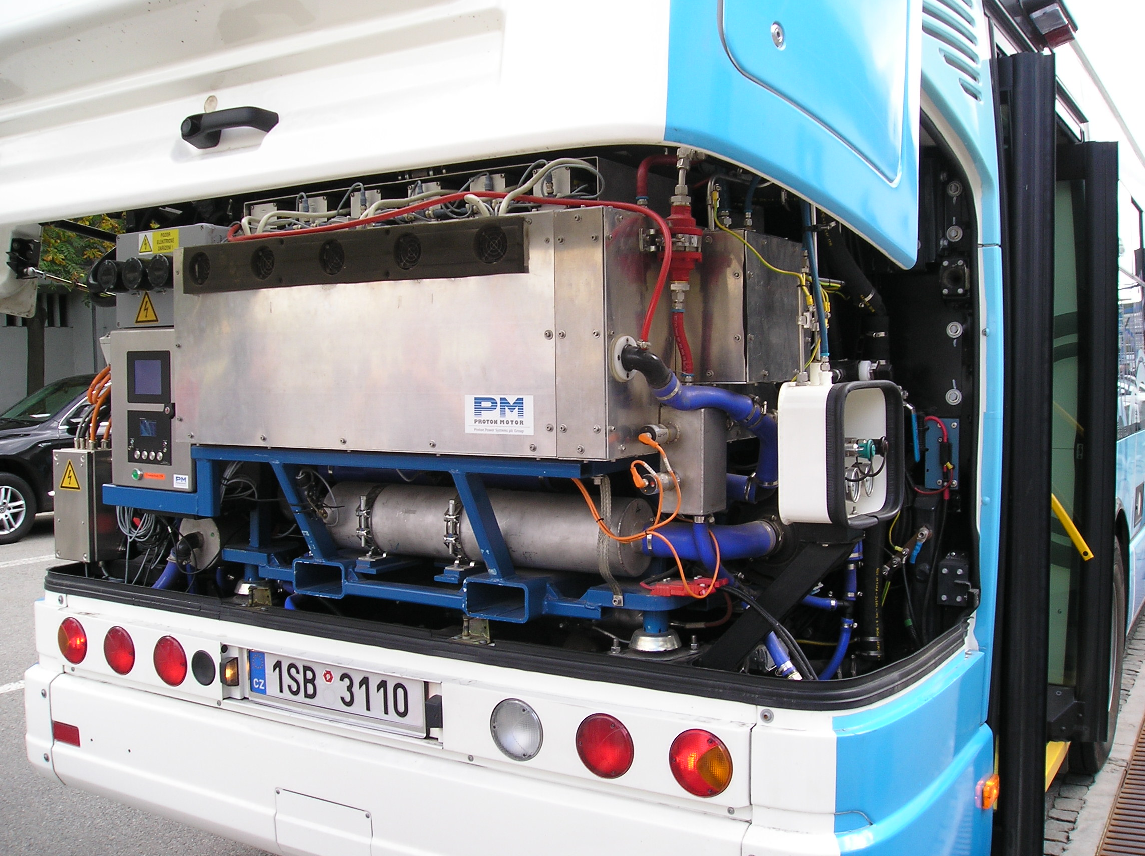 Palivový článek TriHyBusu